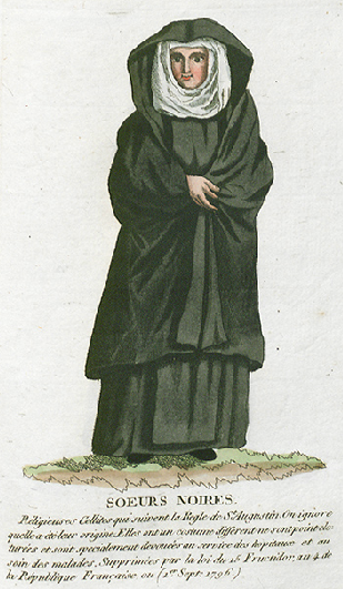 Collection de costumes de tous les ordres monastiques, supprimés à differentes époques, dans la ci-devant Belgique, Bruxelles, Philippe Joseph Maillart et sœur, 1811